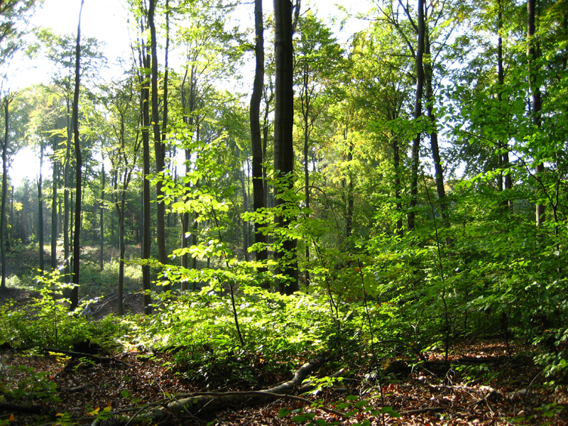 beech forest, Dübener Heide, Germany